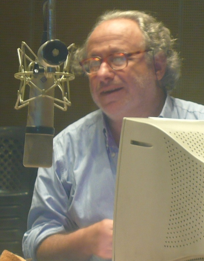 Mario Wainfeld entrevista a Liliana Herrero en la ciudad de Mar del Plata (2007).